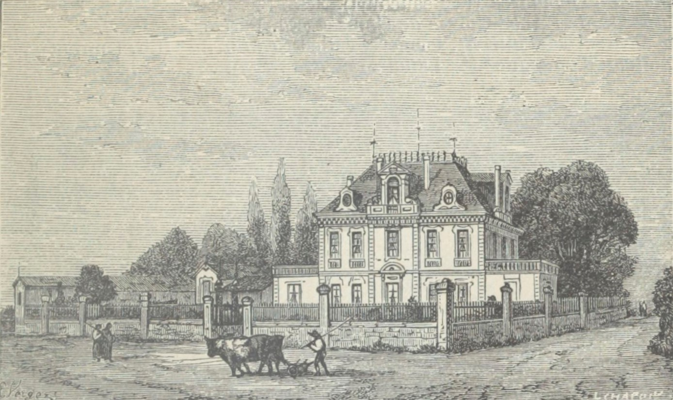 Illustration du Château Malescot Saint-Exupéry dans l'ouvrage Bordeaux et ses vins (7ème édition) de Charles Cocks et Edouard Féret publié en 1898